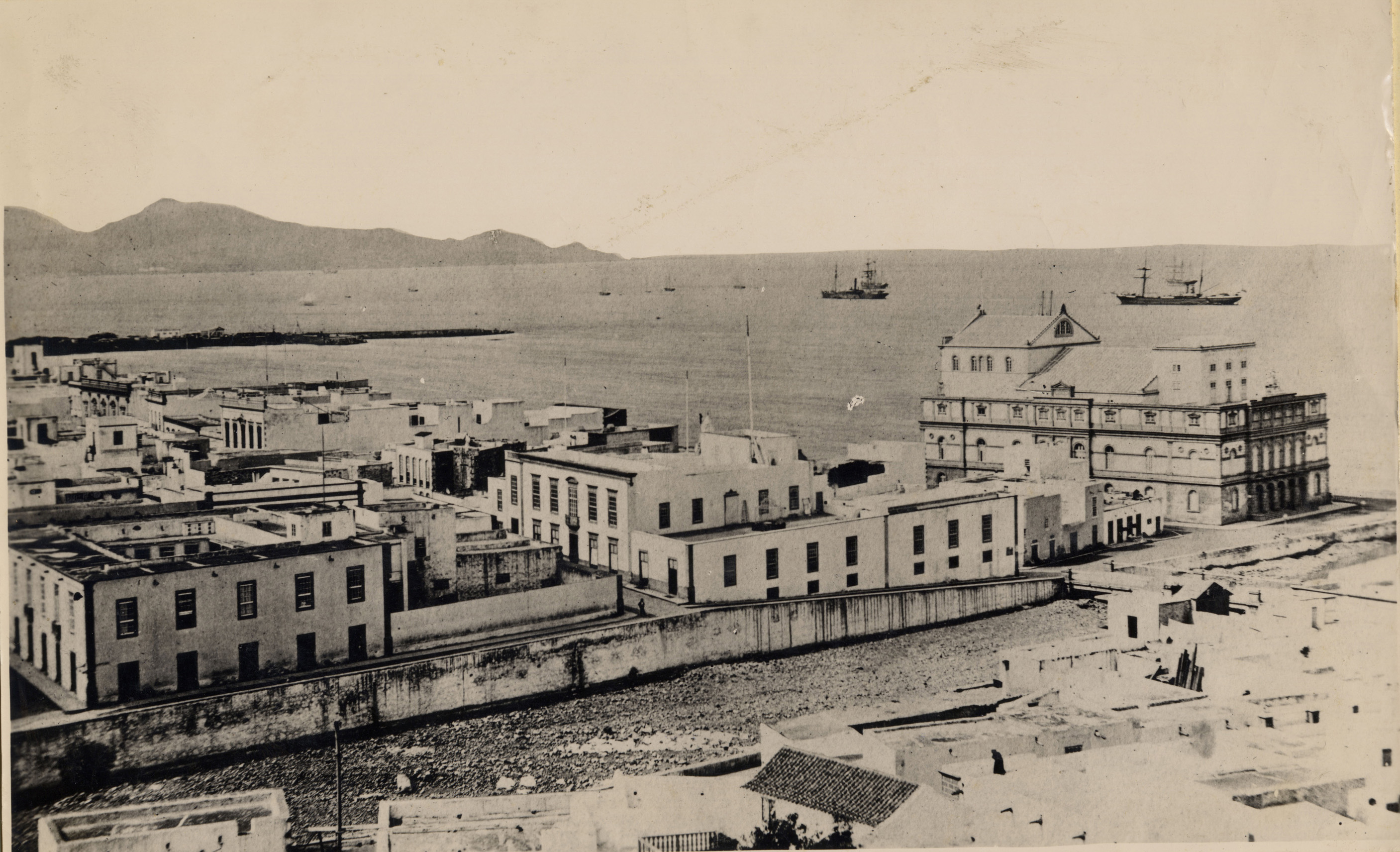 Desembocadura del barranco Guiniguada y Teatro Pérez Galdós desde la torre de la Catedral. Las Palmas de Gran Canaria (Gran Canaria). Islas Canarias, España.